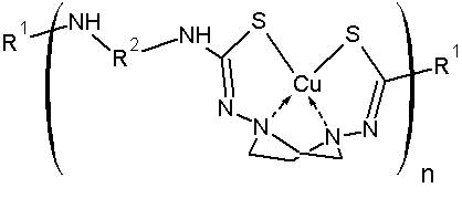 Un polímero bioeficaz de cobre